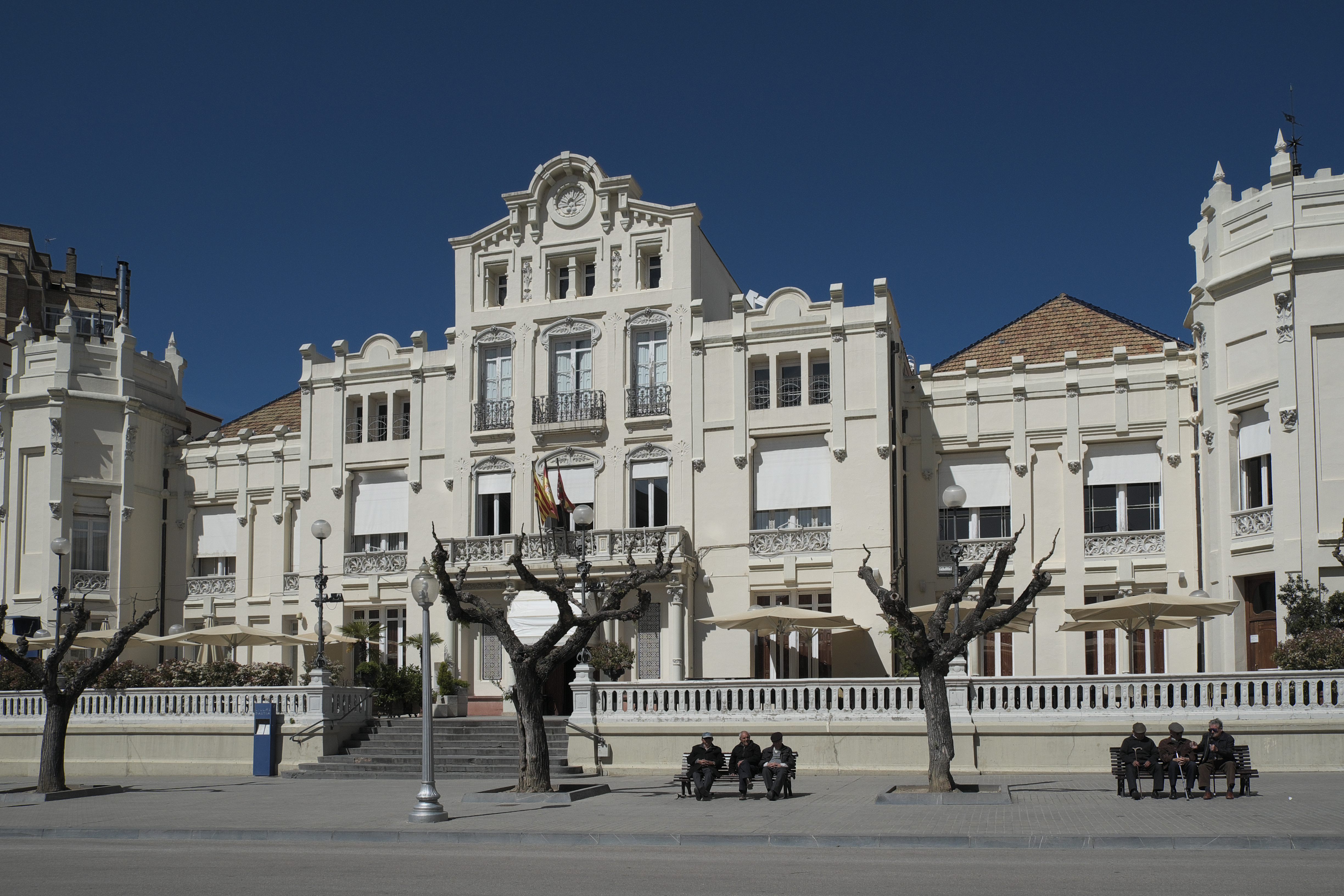 Casino de Huesca, auch Círculo Oscense, in Huesca (Aragón/Spanien)